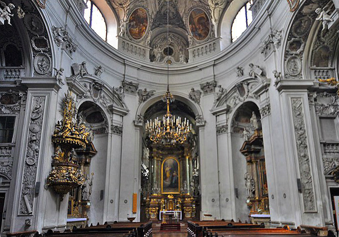 Innenansicht der Klosterkirche des Servitenklosters in Wien